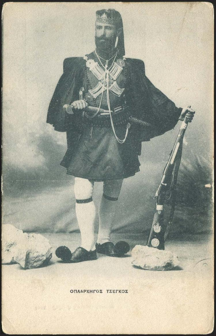 Димитриос Ценкос.